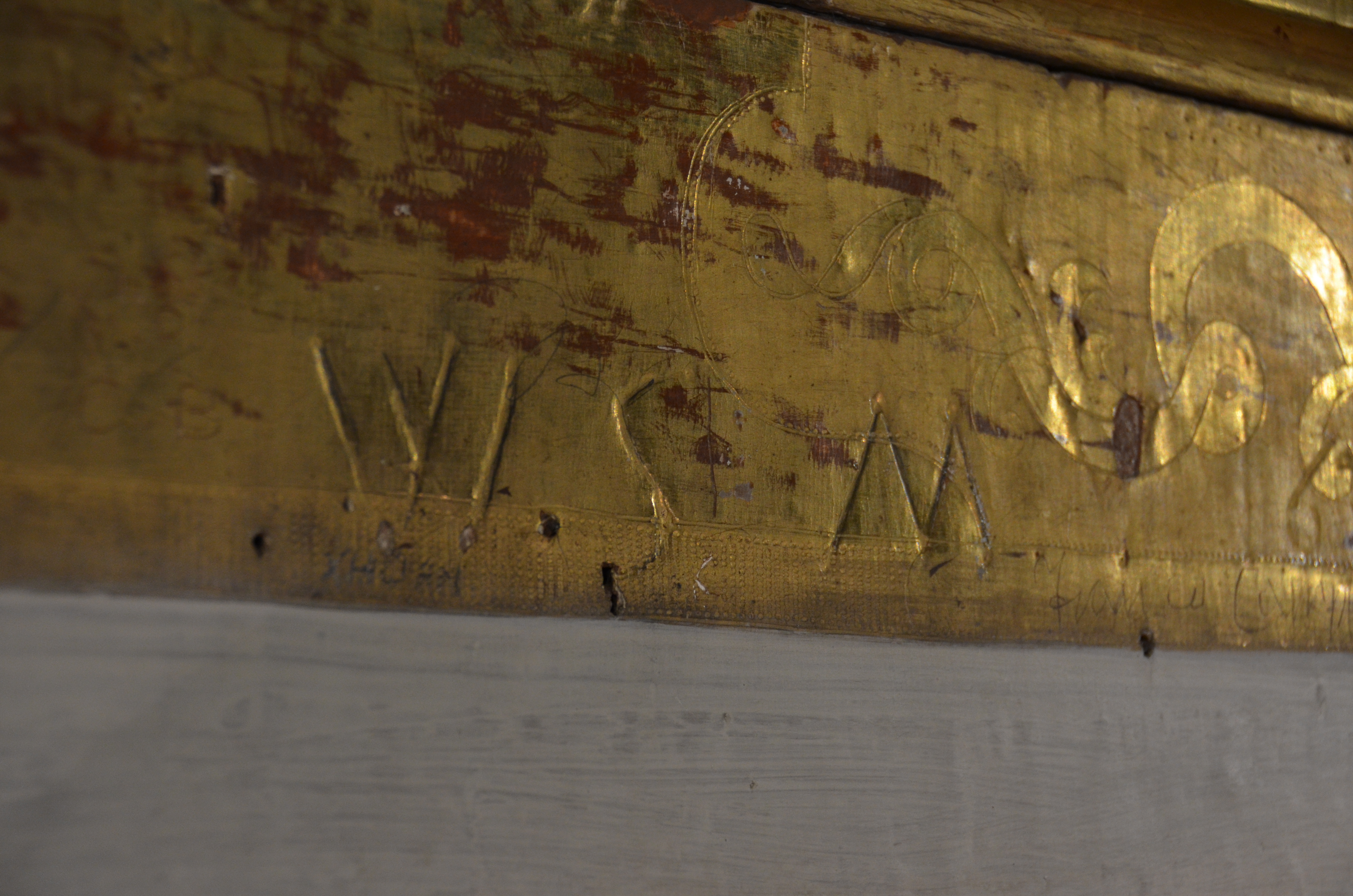 incisione fatta sulla cassa lignea dell'organo Bonatti di san Tomaso a Verona da W.A.Mozart che, quattordicenne, dopo aver tenuto un concerto col coltellino incise le sue iniziali W.S.M cioè Wolfang Salisburgensis Mozart